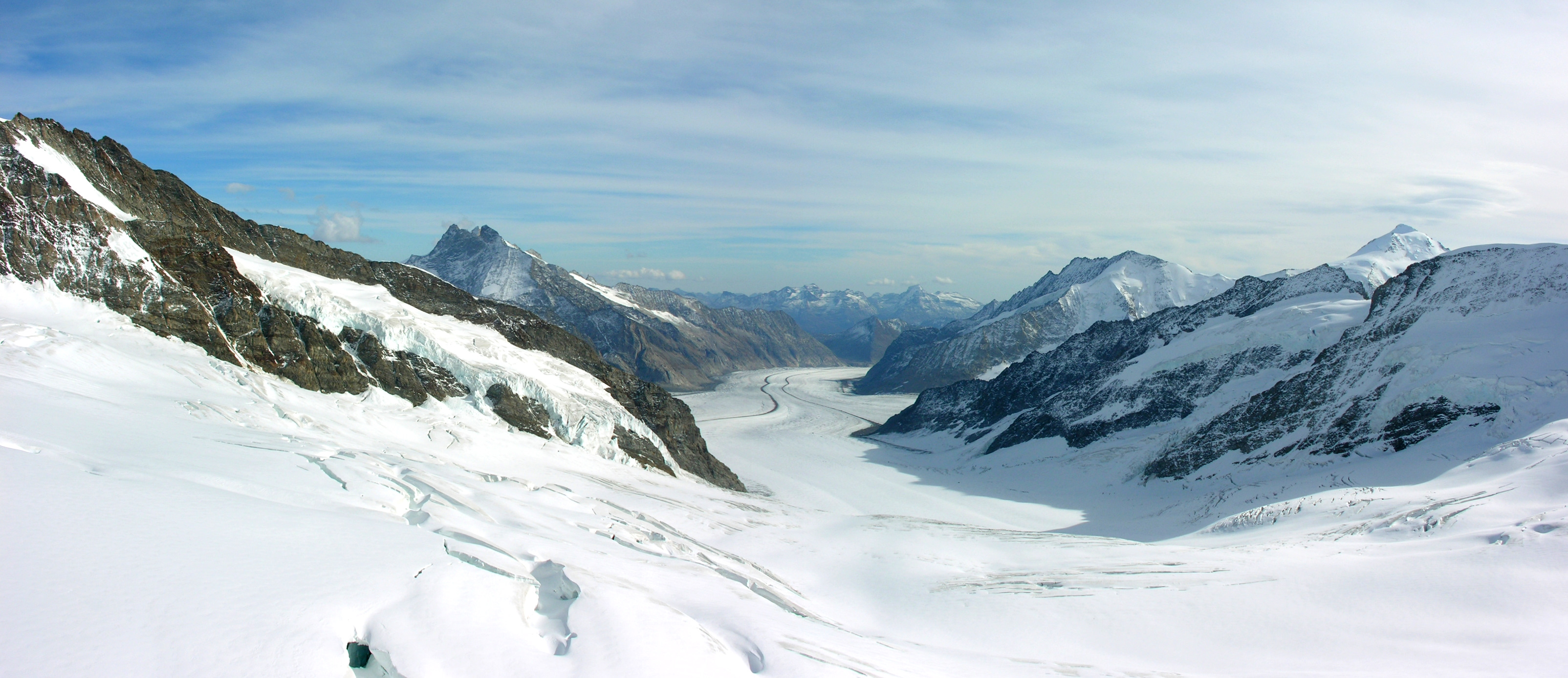 Switzerland, Valais, Jungfraujoch